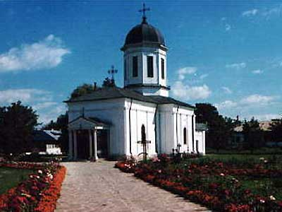 Biserica nouă a mănăstirii Zamfira